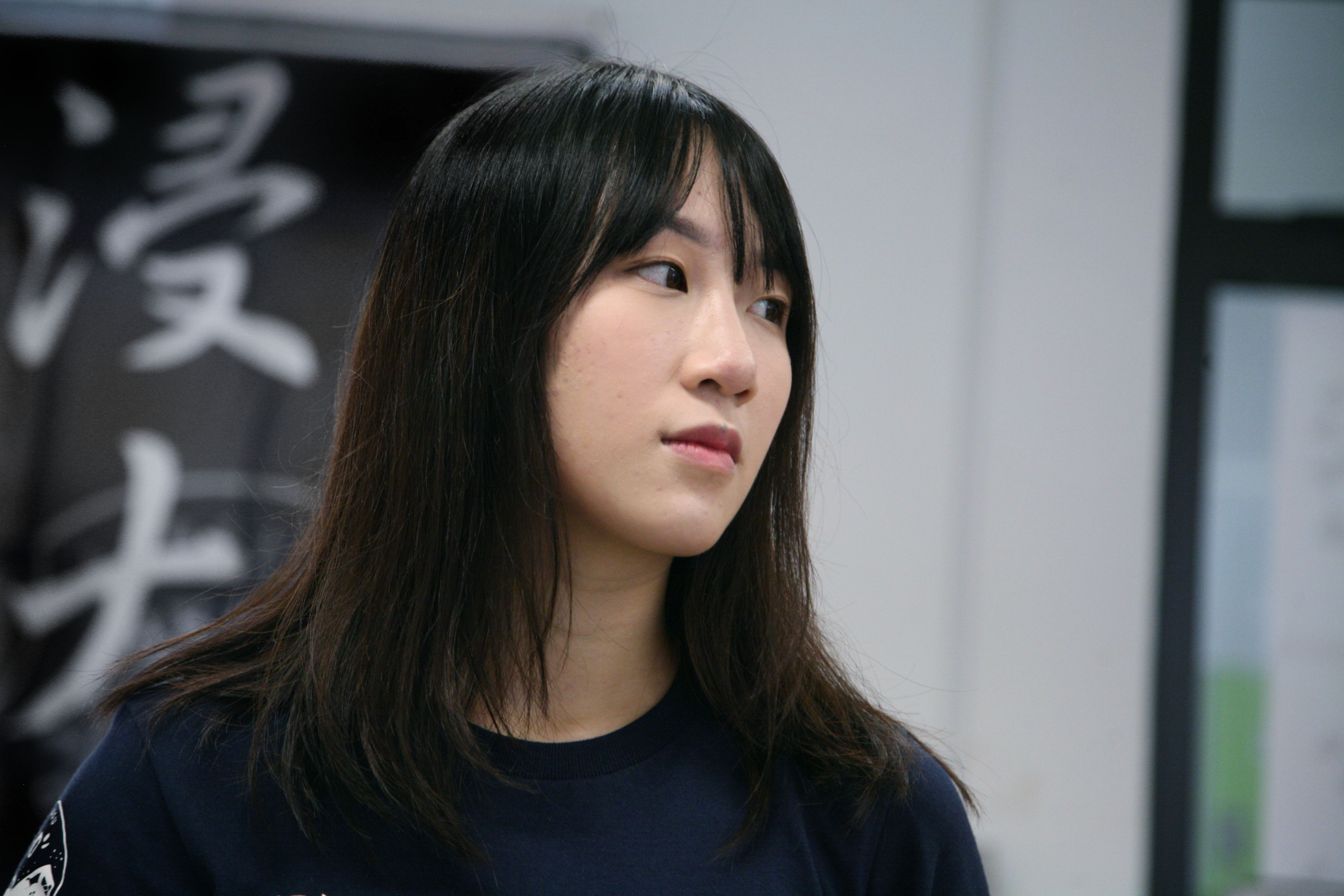 梁兆玉在香港浸會大學學生會會室。